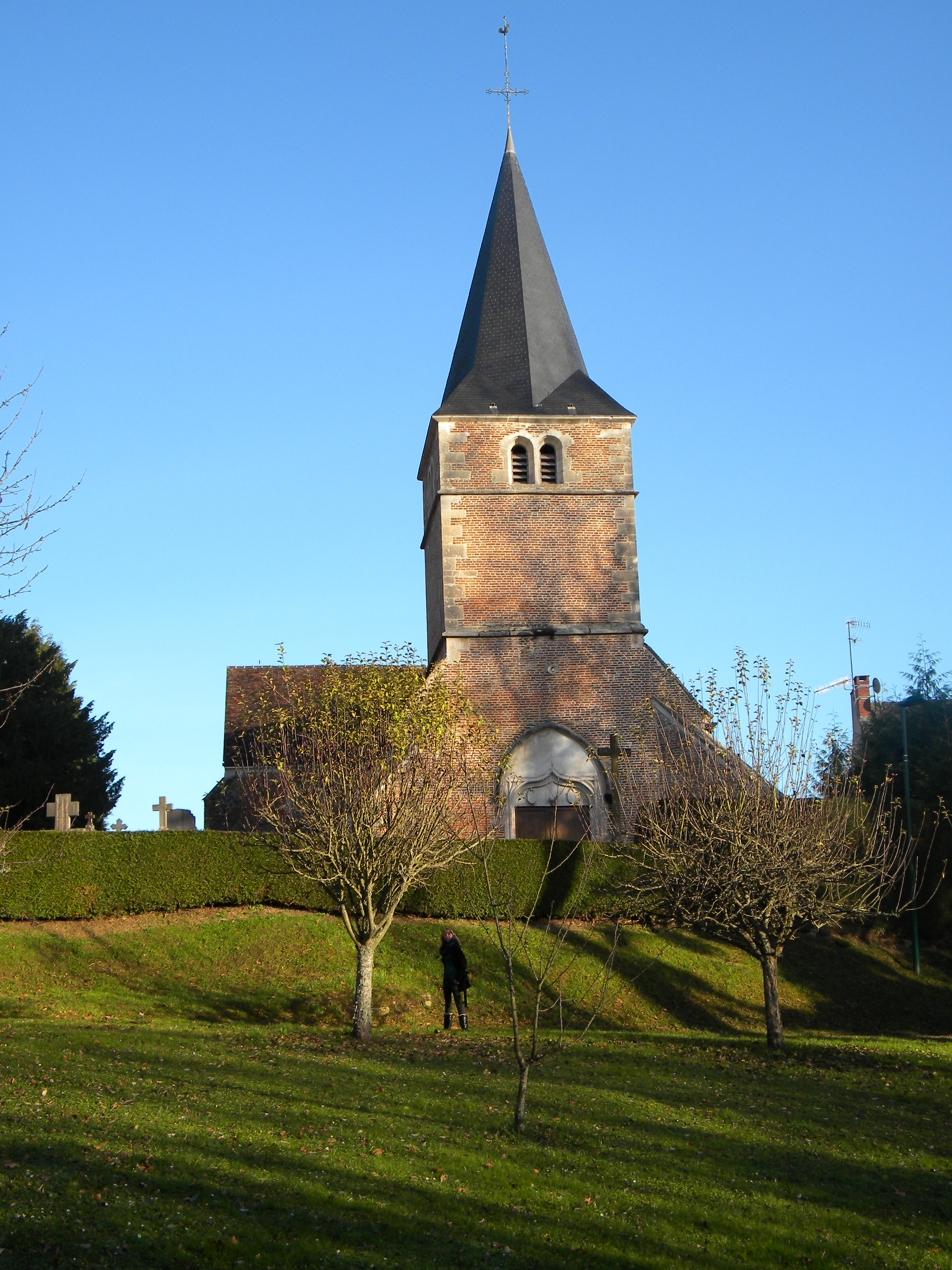 Preĝejo de Auvillars-sur-Saône